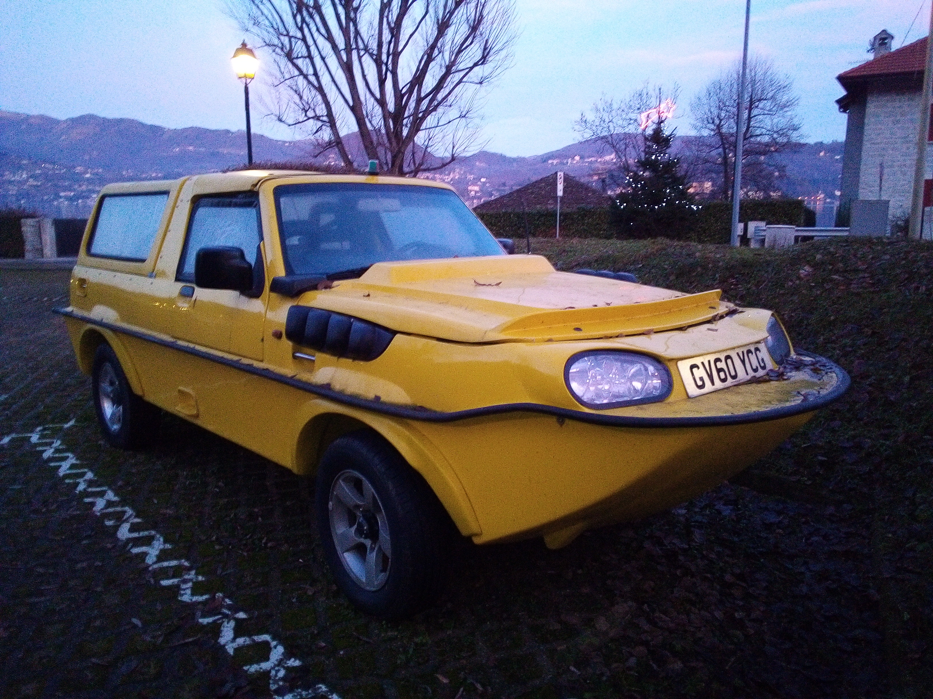 Veicolo anfibio visto in parcheggio del Lago d'Orta